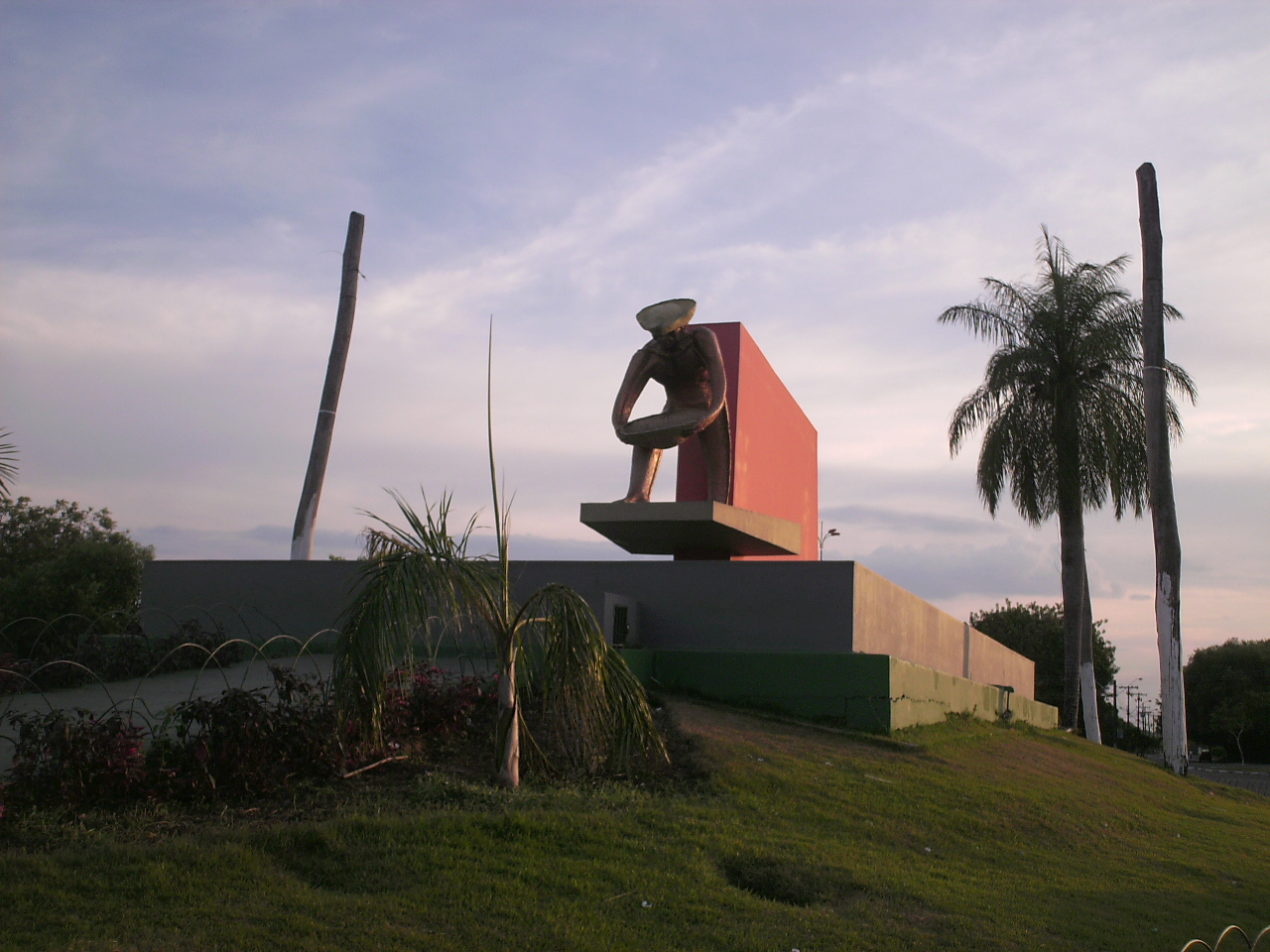 Boa Vista